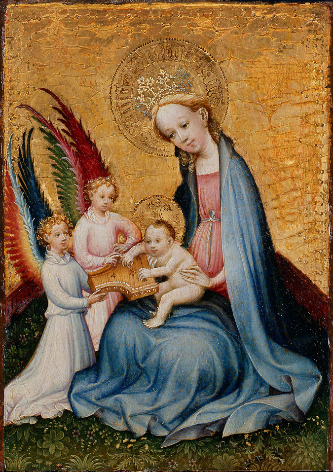 Marie au Paradis WRM Depot 0361